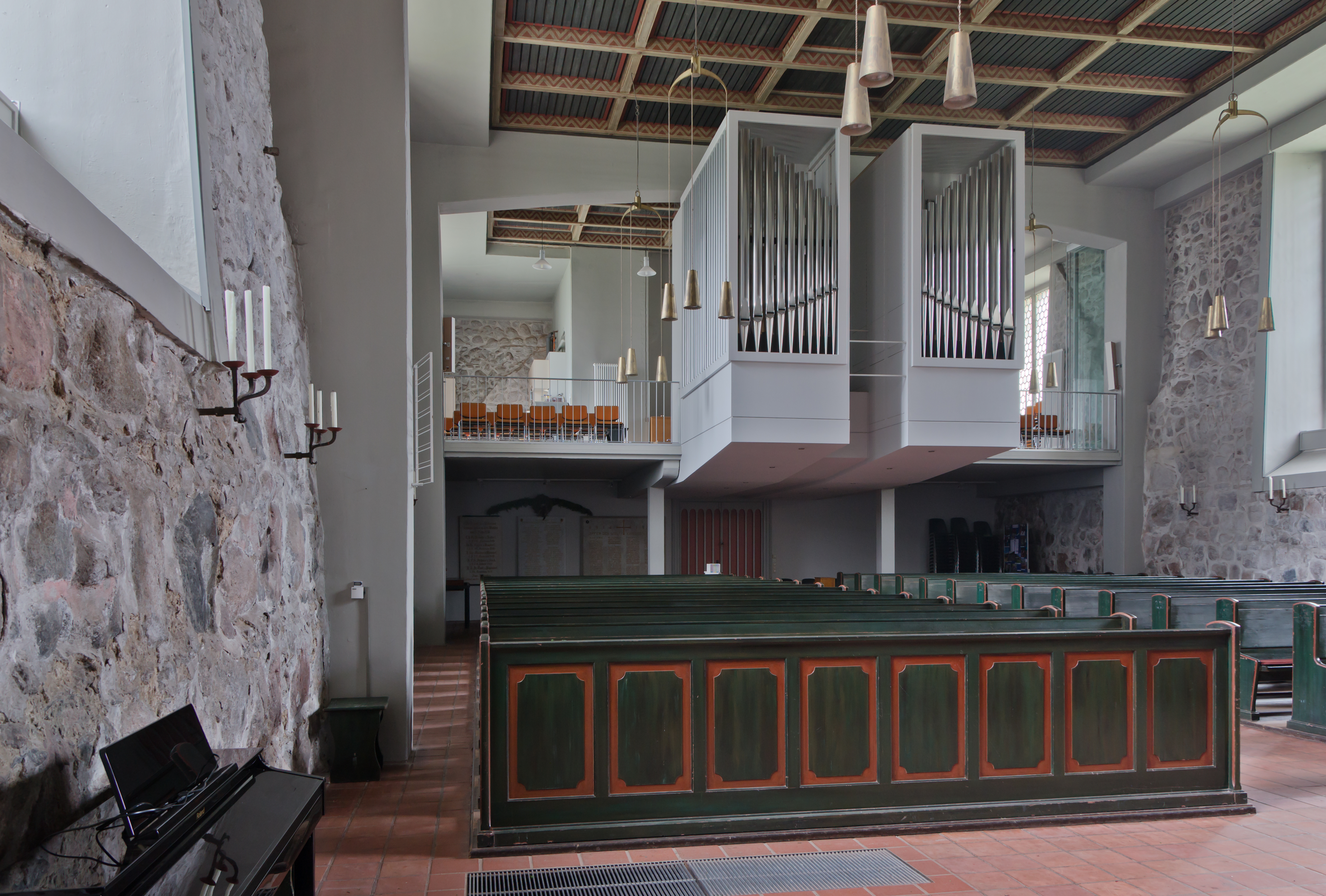 Kirche Siek Blick nach Osten